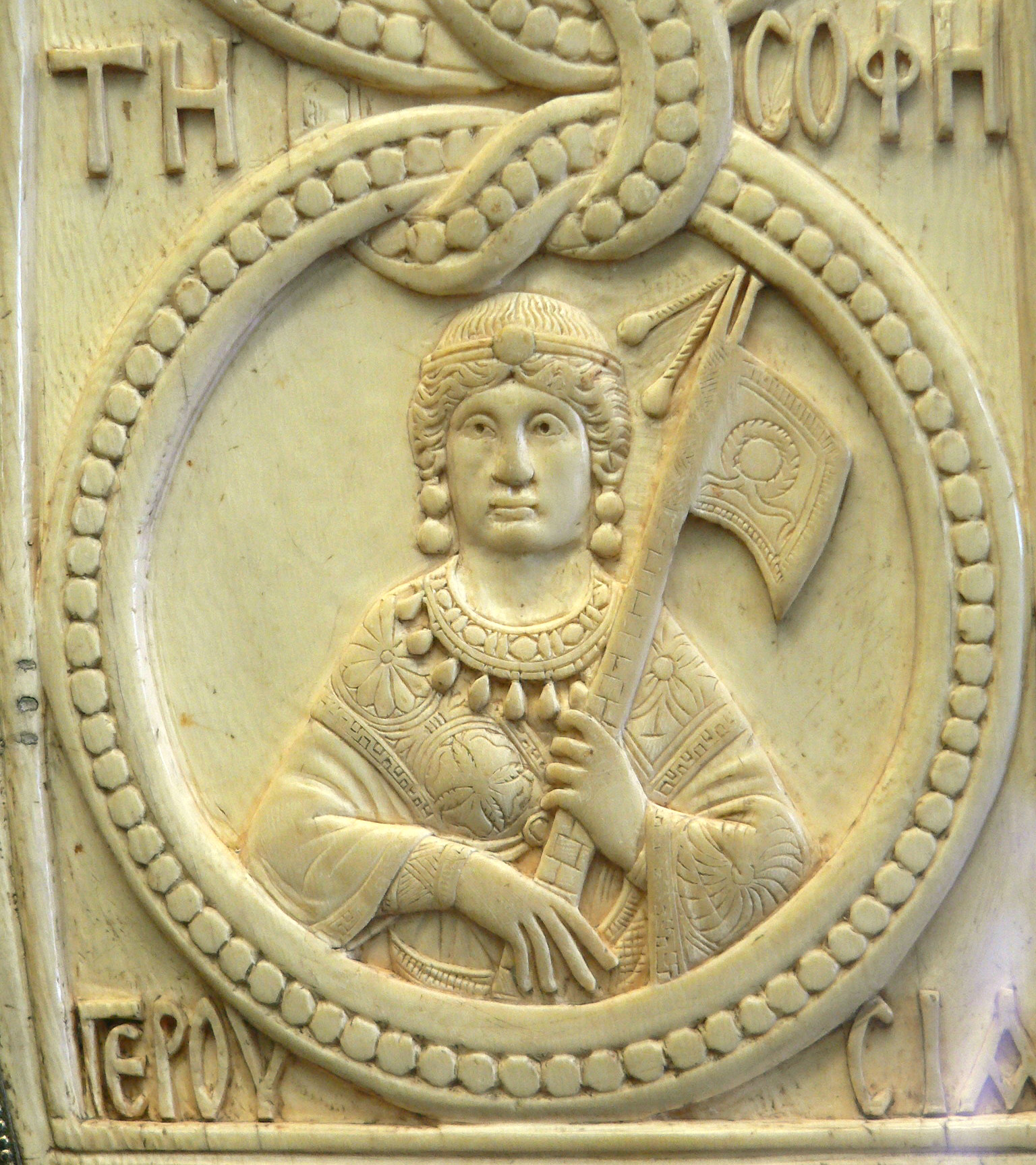 Diptyque de Theodorus Philoxenus Sotericus, feuillet droit, détail Consul en 525 Constantinople Ivoire d'éléphant Monture en métal doré, estampé, France, XIIIe siècle Réutilisé comme plat de reliure d'un manuscrit de Saint-Corneille de Compiègne Bibliothèque Nationale de France, Département des Monnaies, Médailles et Antiques, Chab. 3266 Source:Clio20